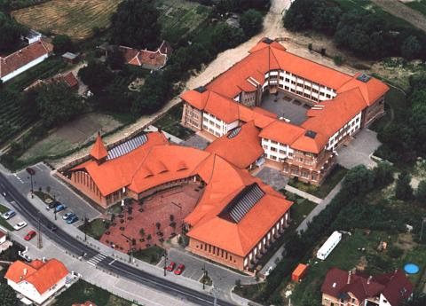 Fabriczius József Általános Iskola, alsós tagozat van Mézesvölgyi Általános Iskola tornaterem és uszoda, (Mogyoródi út 5-7.)[1] A tervező, Zsigmond László Ybl-díjas építész, és Heil Tibor építész; munkatárs: Nagy László. [2]. - Veresegyház, Hungary, aerialphotgraphy